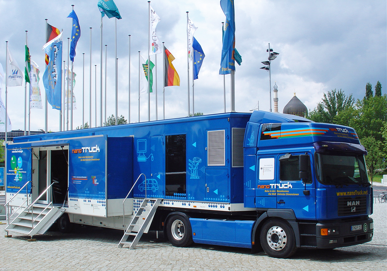 Der nanoTruck im Juli 2004 bei der EXPO SCIENCE EUROPE (ESE) am Congress Center in Dresden. Von 2004 bis 2007 war die Initiative unter dem Kampagnentitel "Reise in den Nanokosmos – Die Welt kleinster Dimensionen“ bundesweit in Deutschland unterwegs.